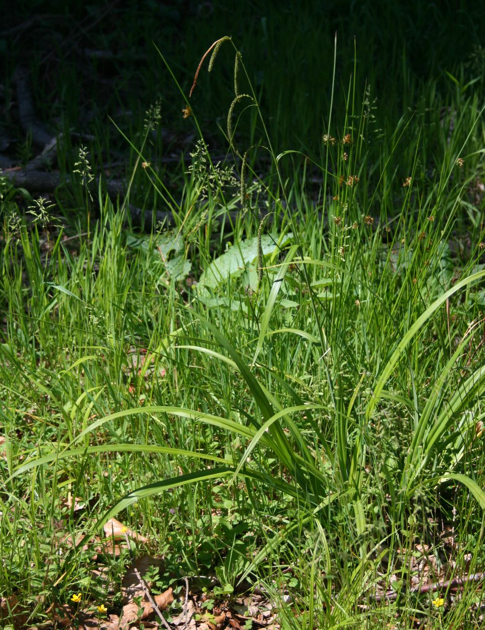 Hänge-Segge (Carex pendula), Sauergräser (Cyperaceae) - Österreich/Austria/Autriche: Oberösterreich, Hausruckviertel, ca. 2.6 km NE Forsthaus Redltal, ca. 680 m s.m.